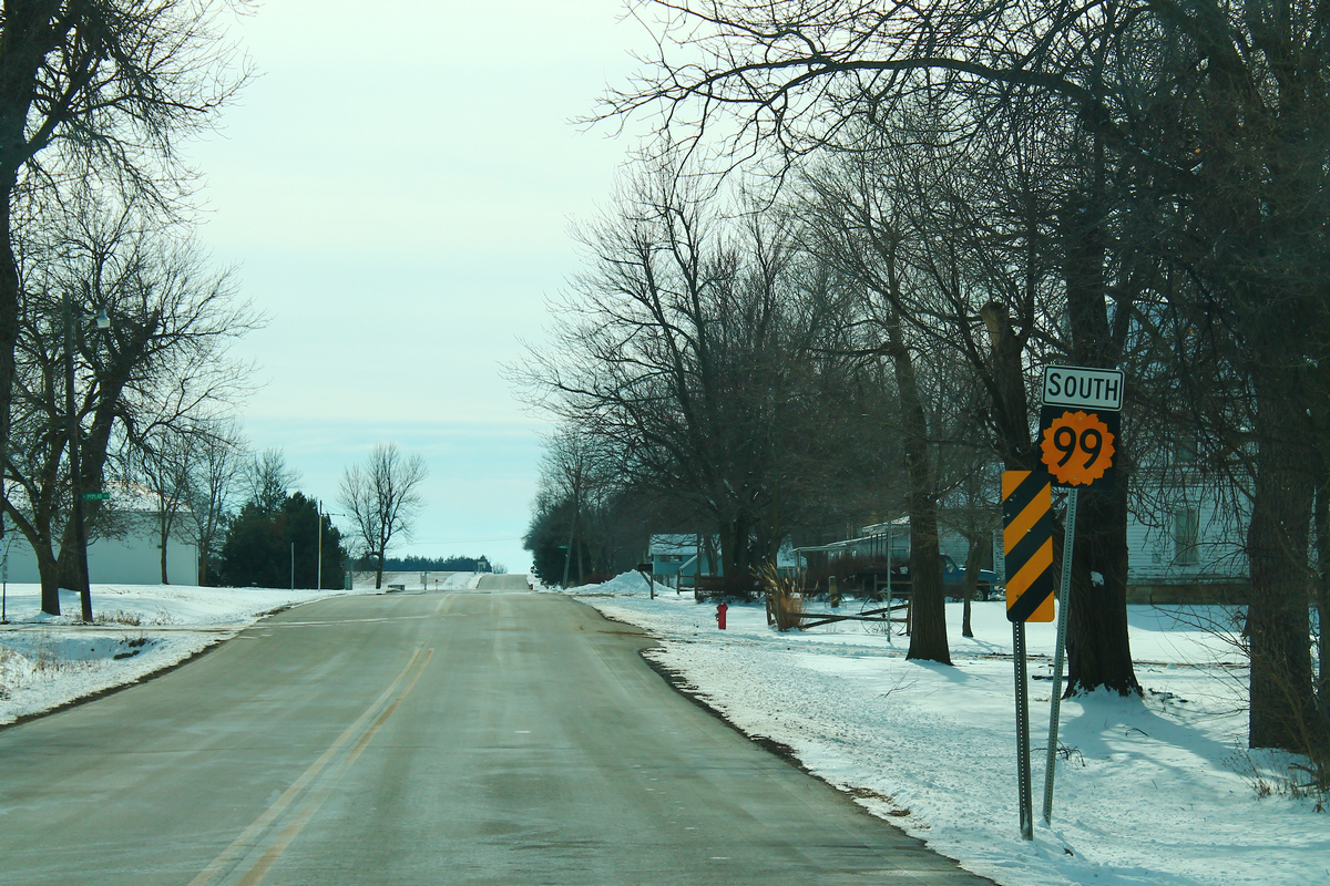 KS99sSignRoad-Summerfield